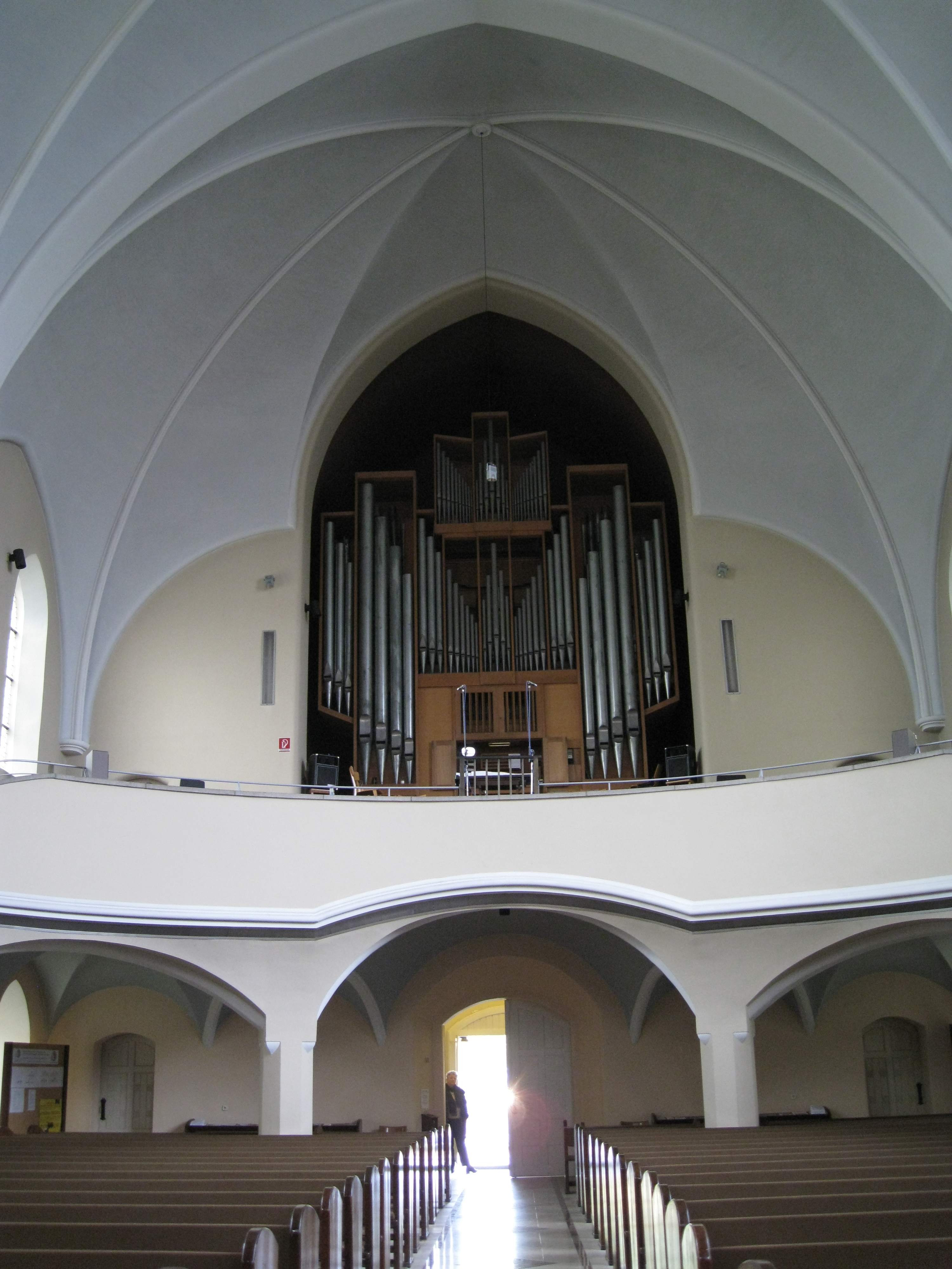 Blick auf die Orgelempore